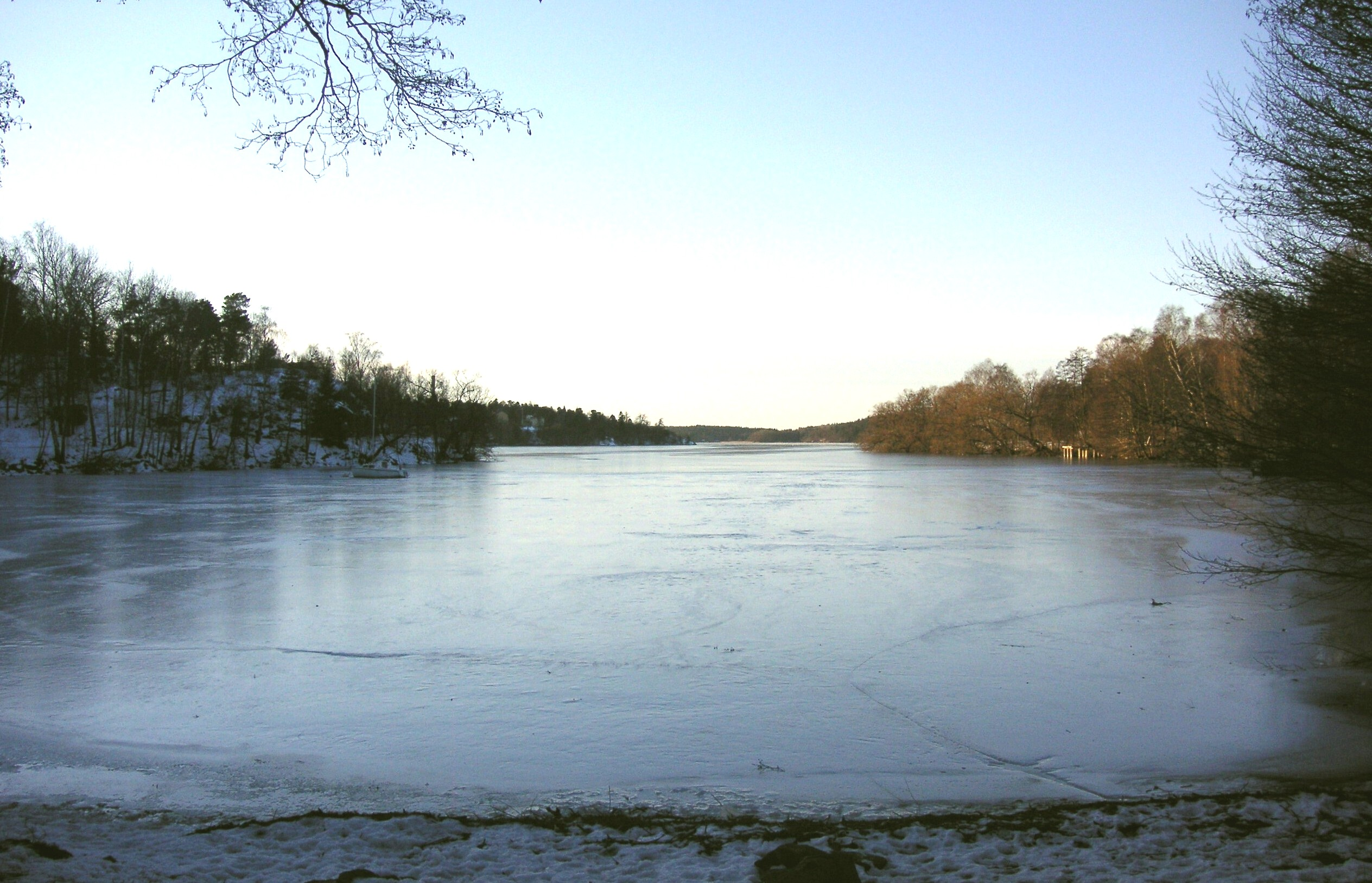 Vinterviken in Stockholm, Richtung Westen gesehen